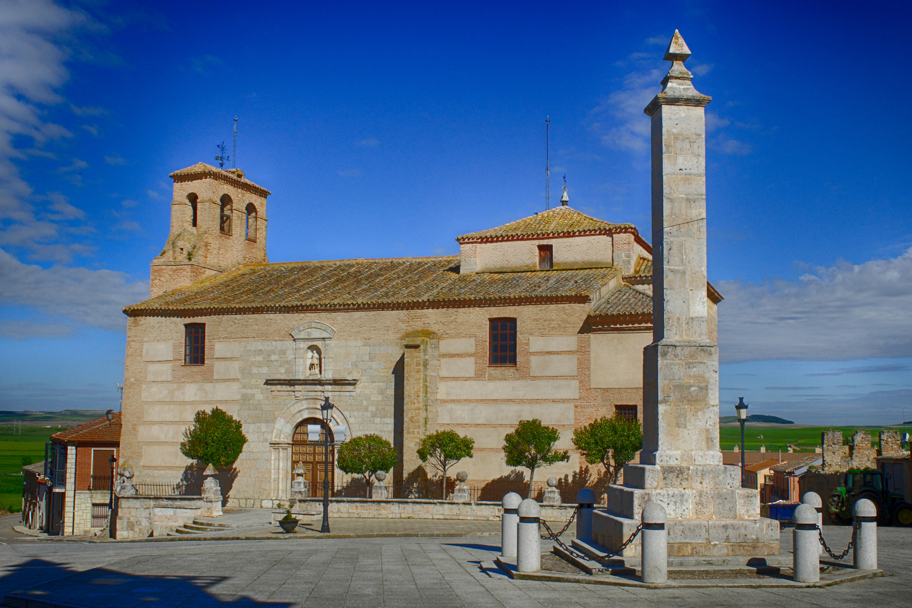 Monolito en honor a los jefes comuneros e Iglesia parroquial de San Juan Bautista. Villalar de los Comuneros, Provincia de Valladolid, Castilla y León, España